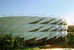 Edifio de Usos Múltiples CJM